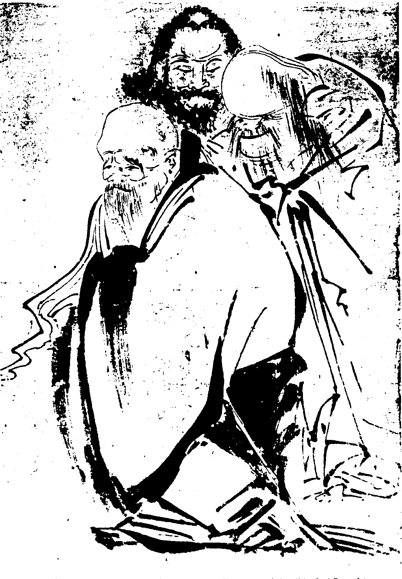 Tři doktríny (konfucianismus, taoismus a buddhismus), autorství připisováno Džosecuovi (počátek 15. století)